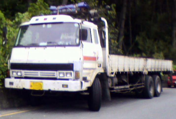 1988~1992년식 대우 11톤 카고트럭